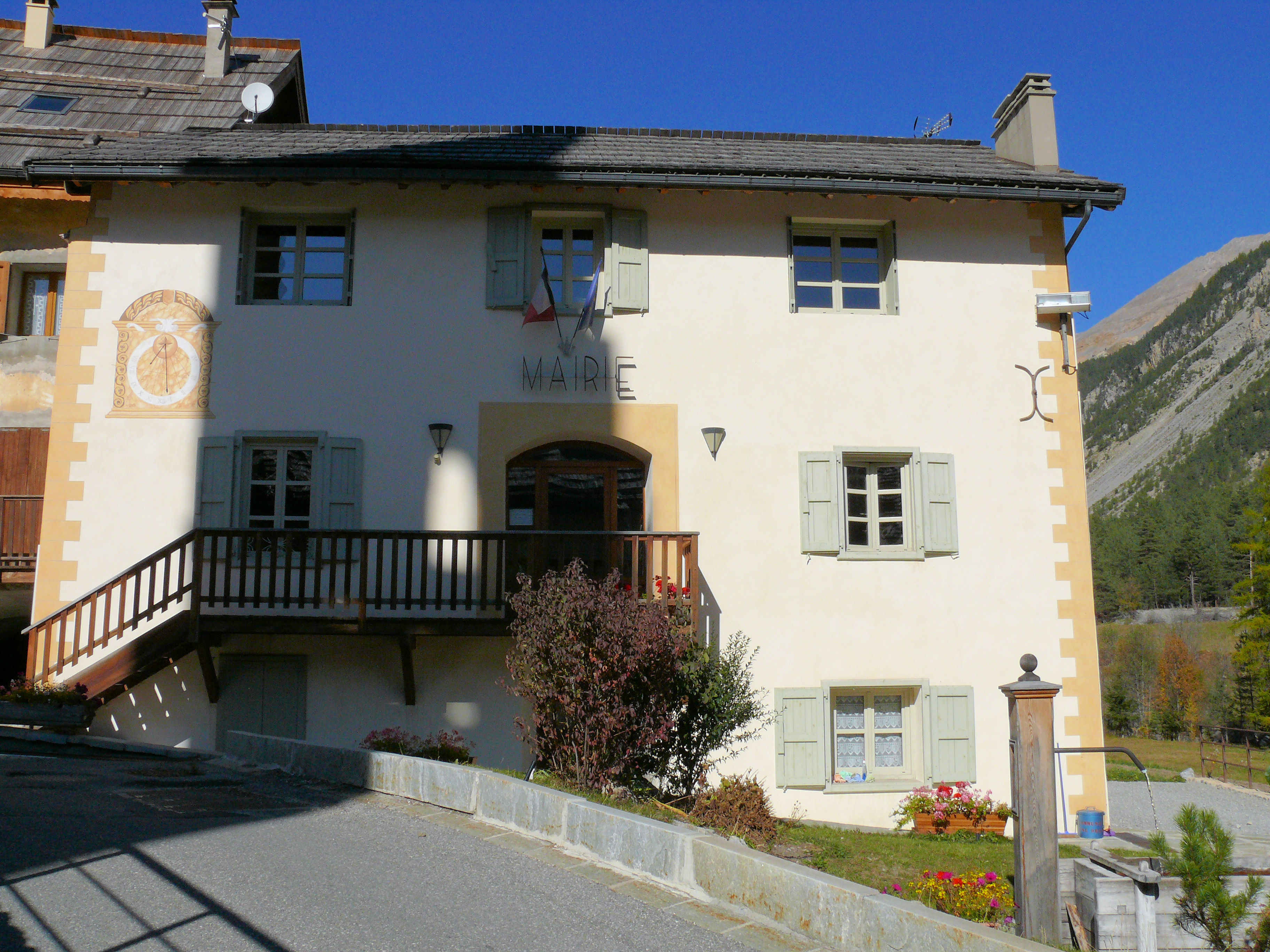 Mairie de Val-des-Prés au Serre, dans l'ombre du clocher de l'église Saint-Claude